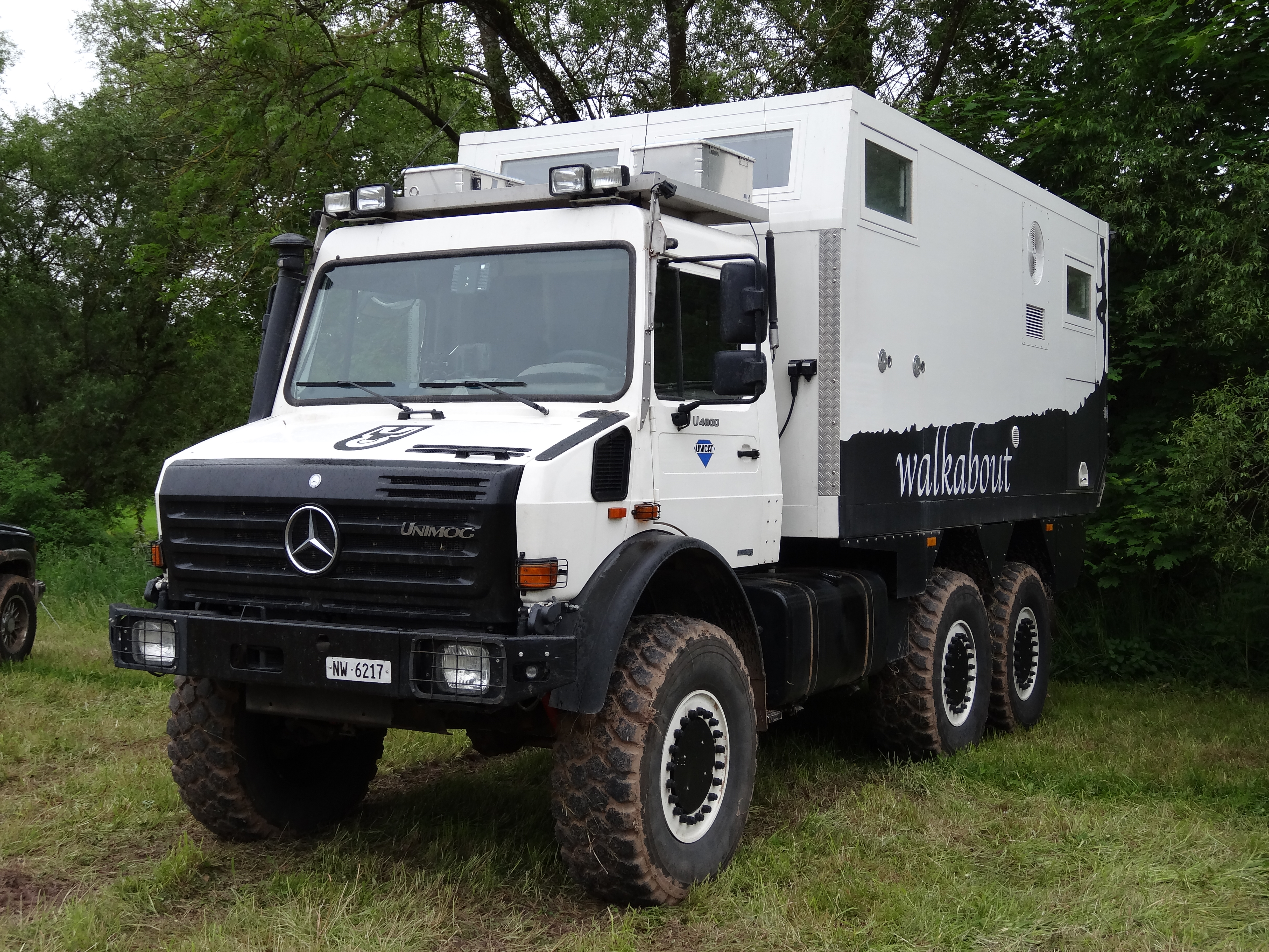 Abenteuer Allrad 2013 437 Unimog